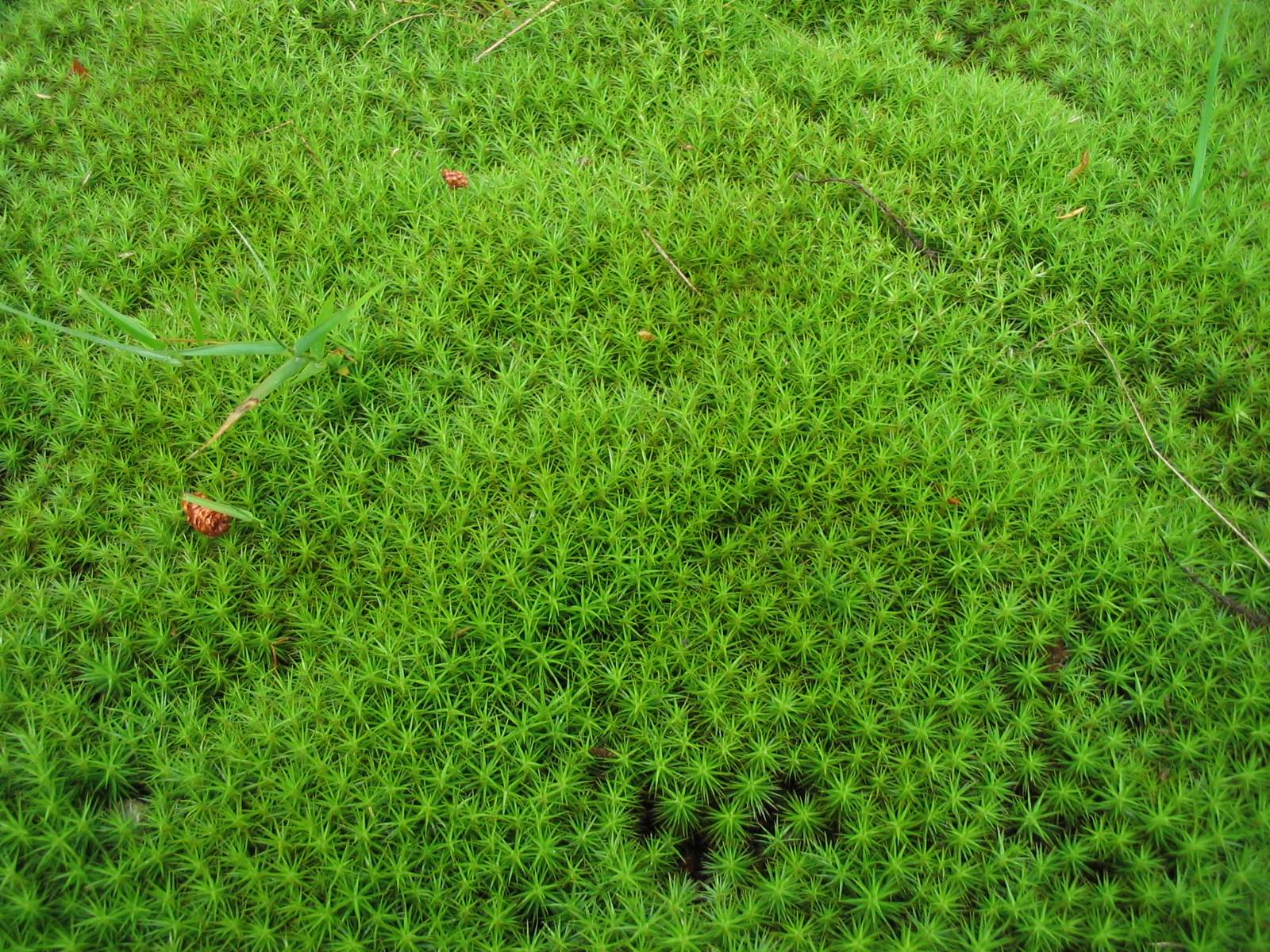 moss